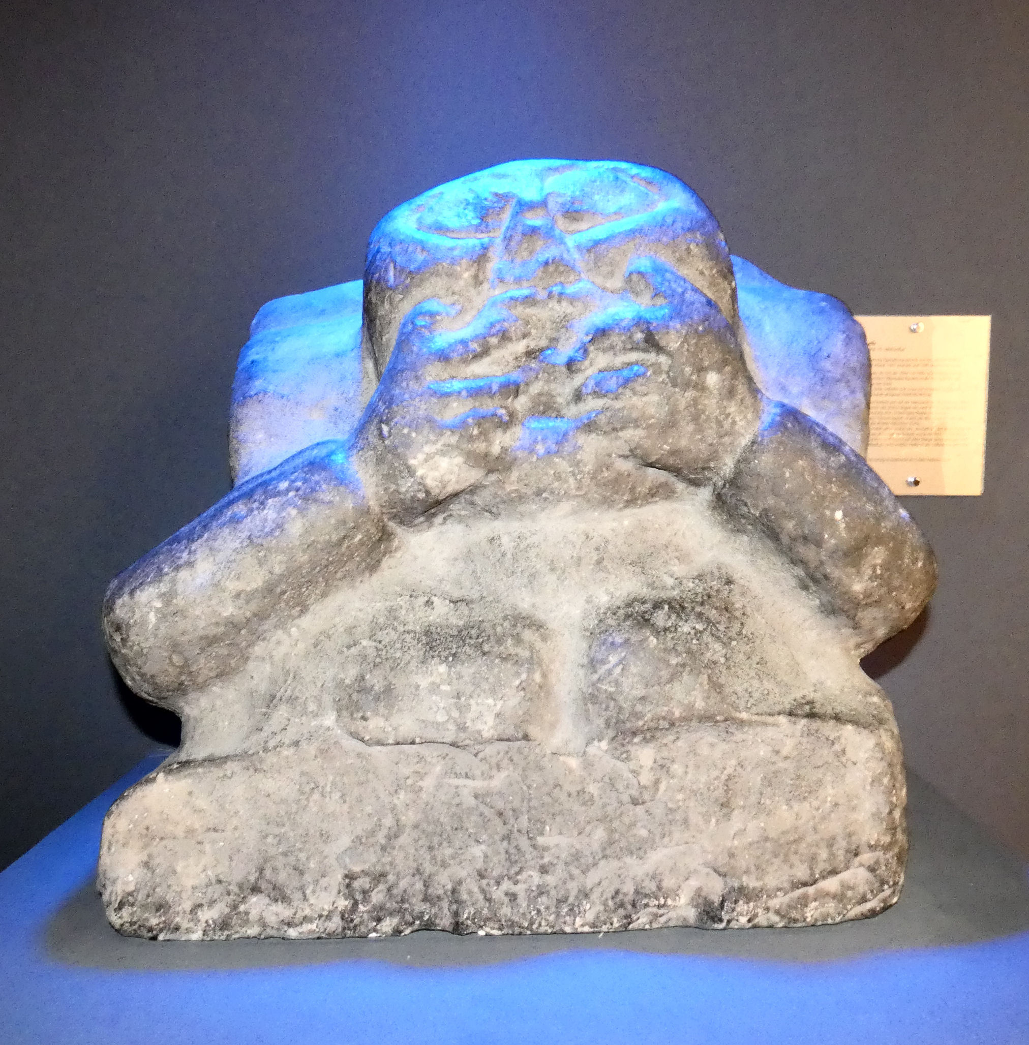 Sandsteinskulptur des "Saalaffen" im Halloren- und Salinemuseum Halle